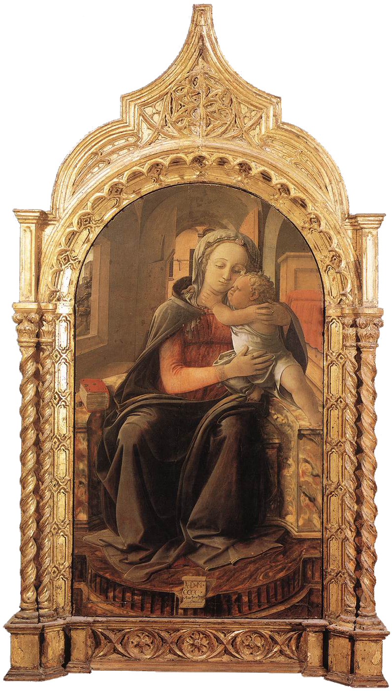 LIPPI, Fra Filippo Madonna with Child (Tarquinia Madonna) Tempera on panel, 151 x 66 cm Galleria Nazionale d'Arte Antica, Rome